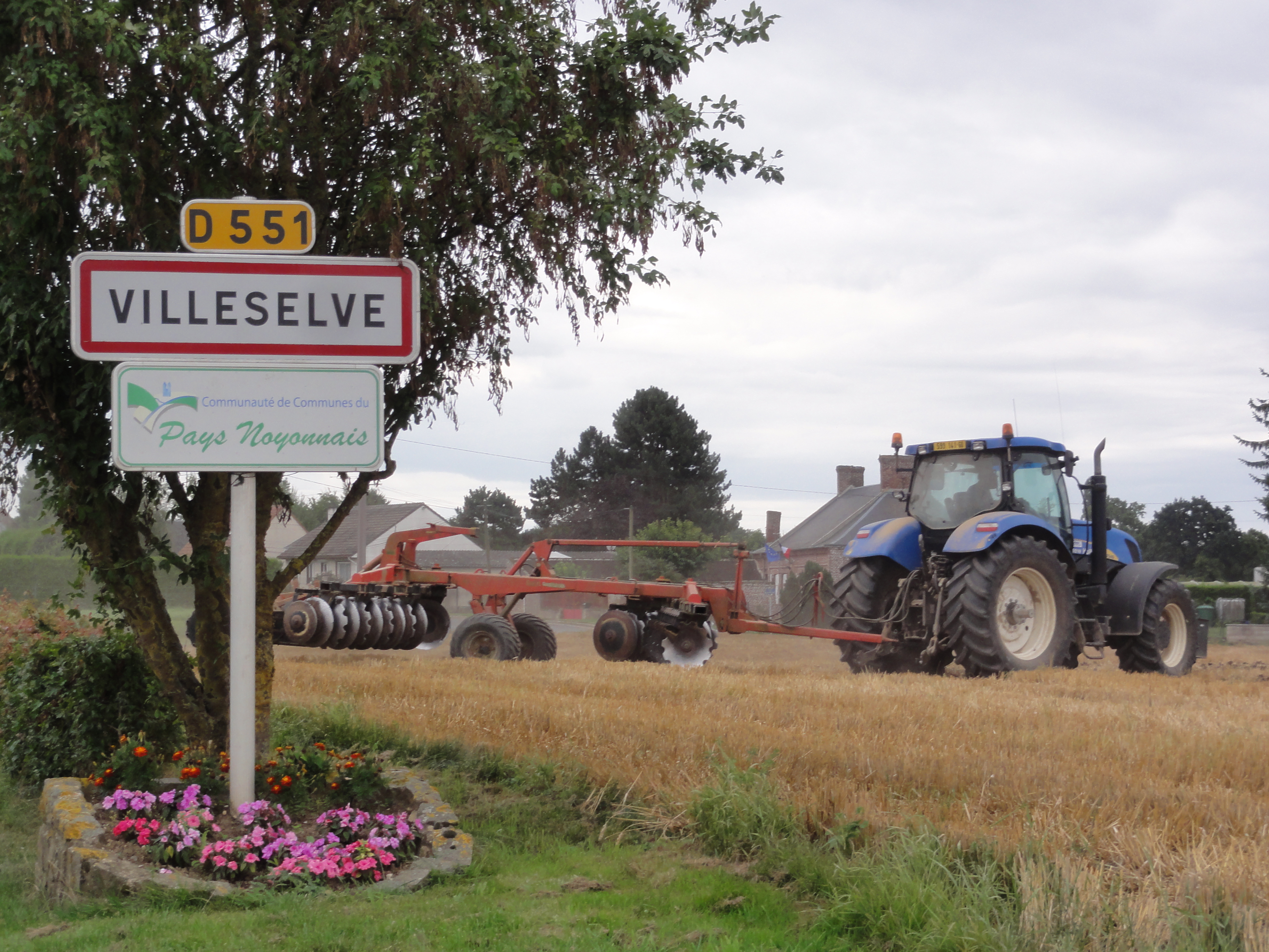 Villeselve (Oise) city limit sign and tractor